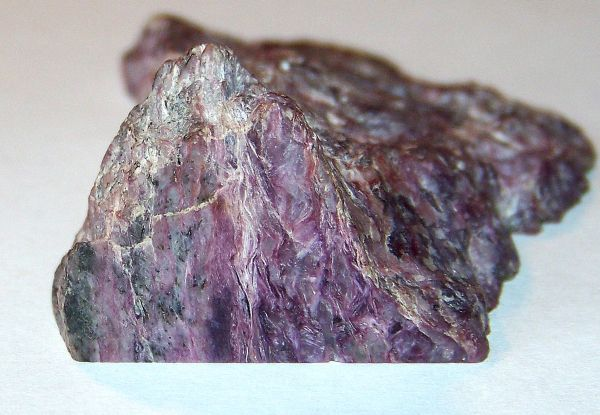 Czaroit w formie zgładu (częśc niepolerowana) wymiary. 3 x 2 cm